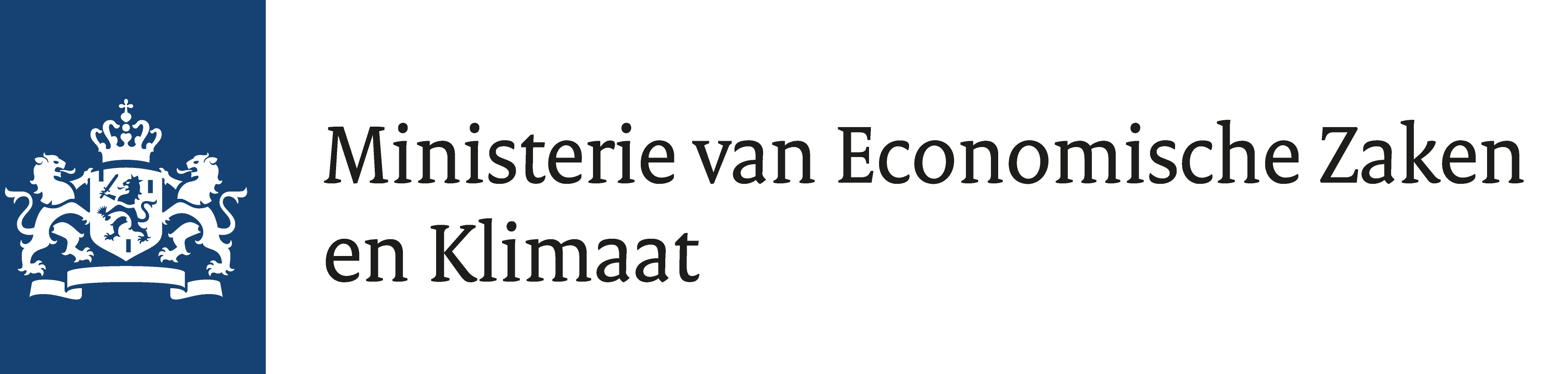 Het officiële logo van het Ministerie van Economische Zaken en Klimaat